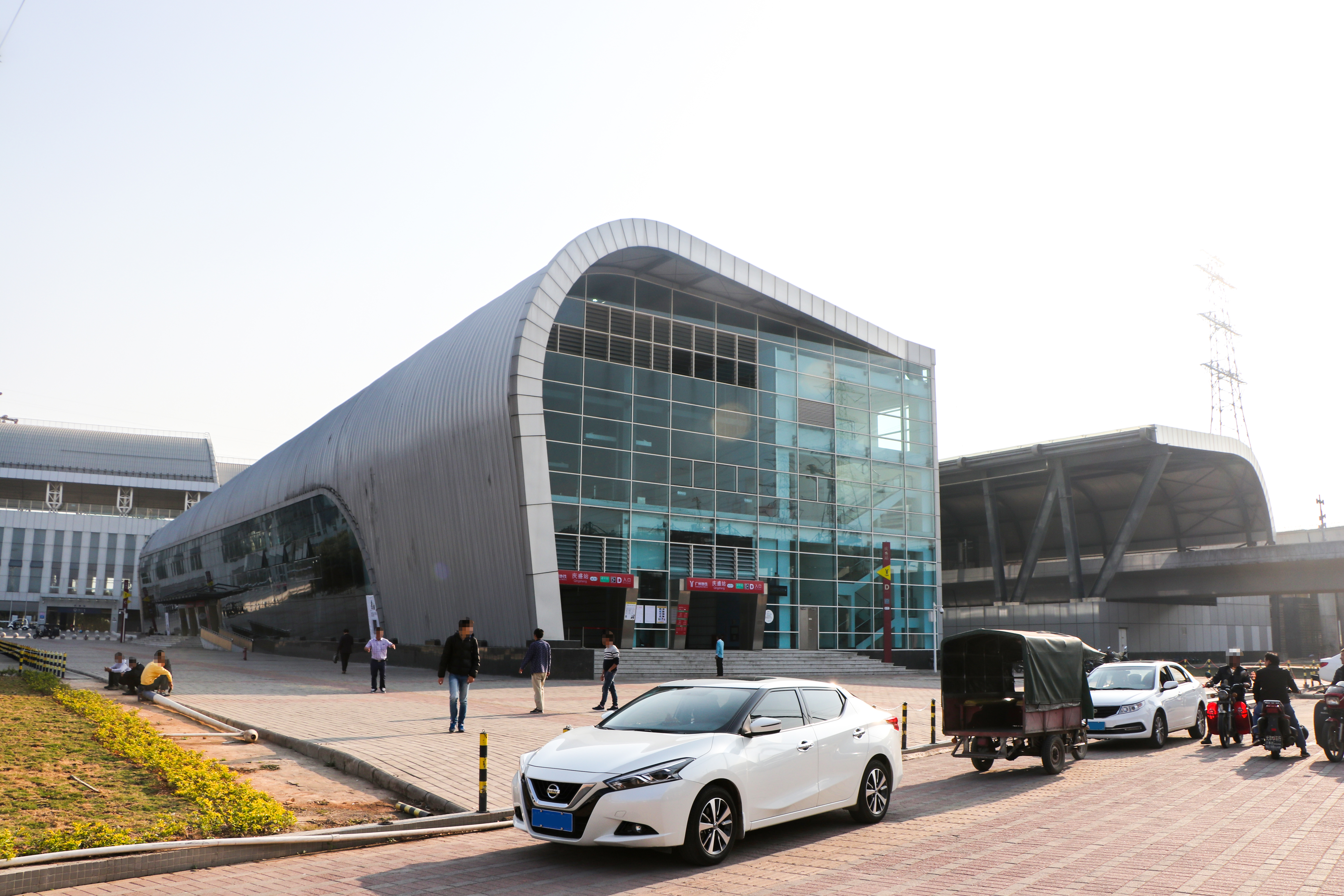 广州地铁庆盛站